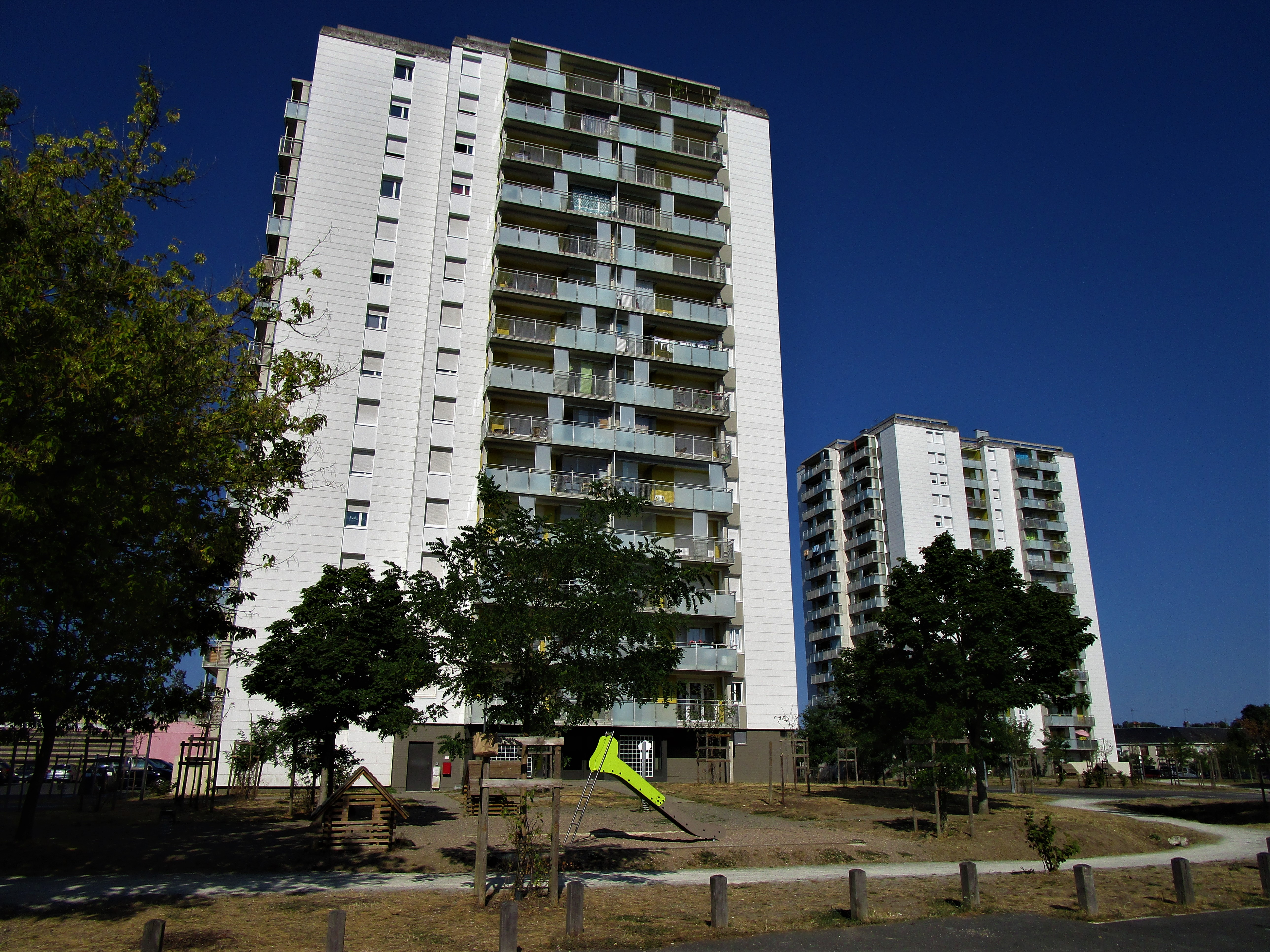 Les tours de l'Aubrière, dans la quartier de la Rabatarie, commune de Saint-Pierre-des-Corps.